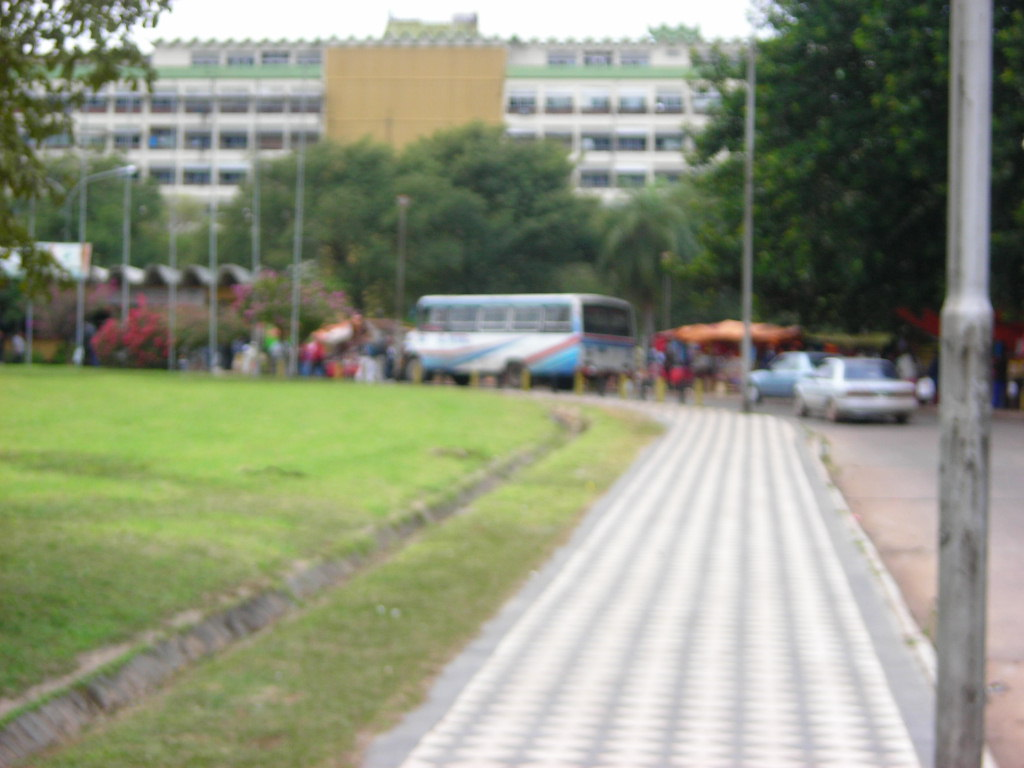 Ips